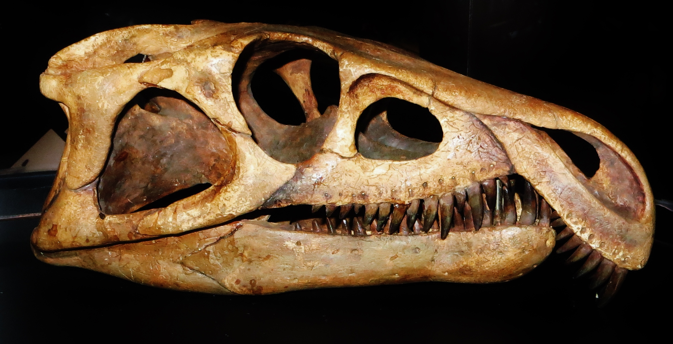 Fossil of Archosaurus, an extinct reptile - Took the picture at Dinosaurium, Prague